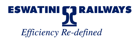 Logo von